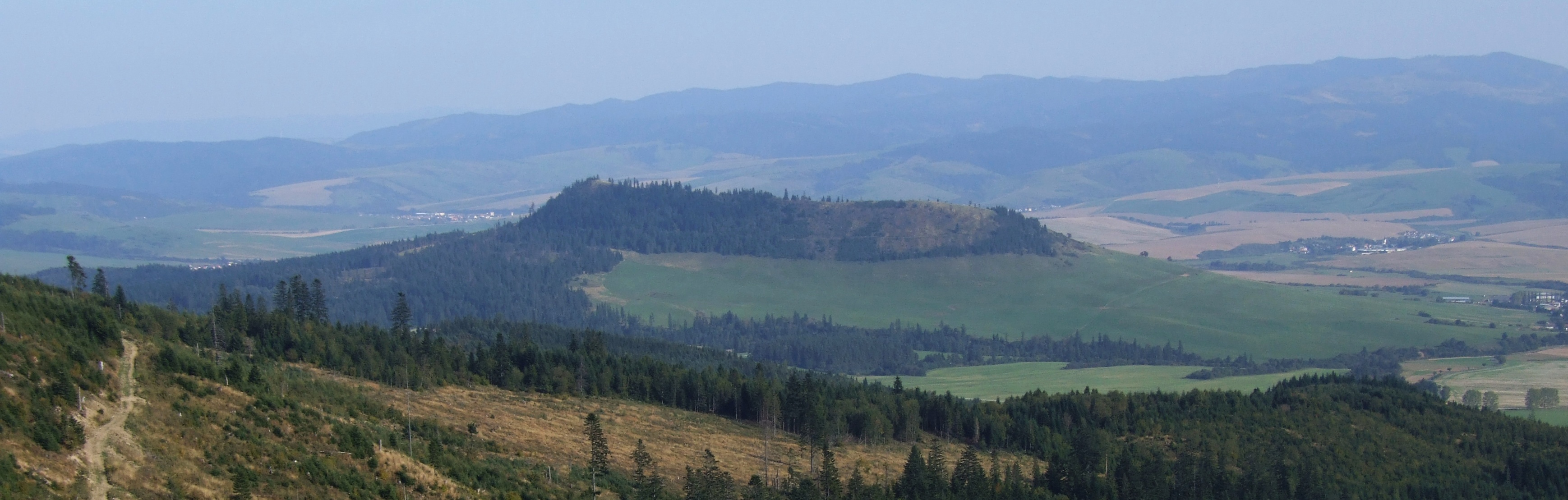 Vojnianska hora. Widok z grani głównej Magury Spiskiej